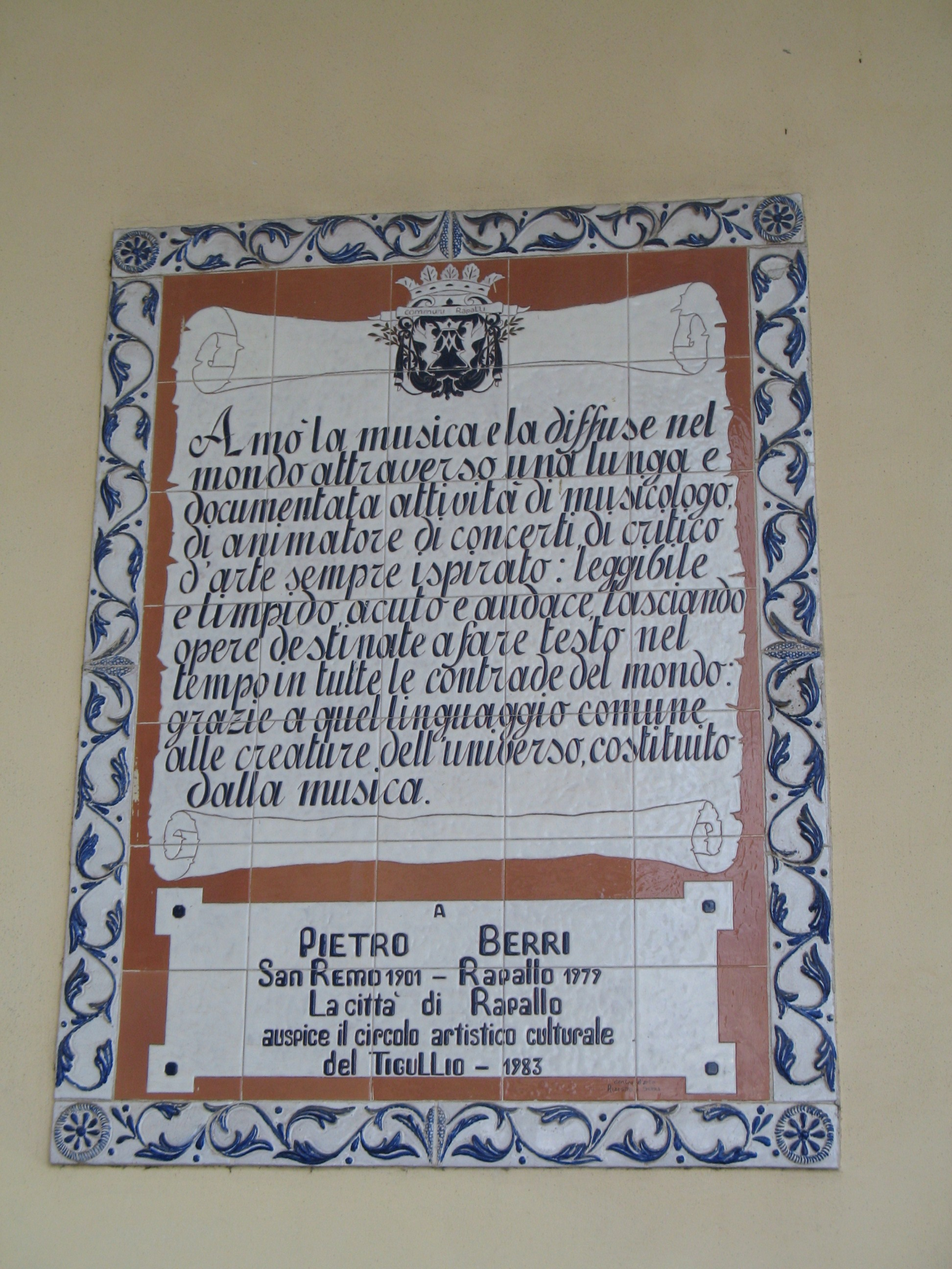 Serie di Immagini da Rapallo e San Michele di Pagana (Rapallo), in provincia di Genova